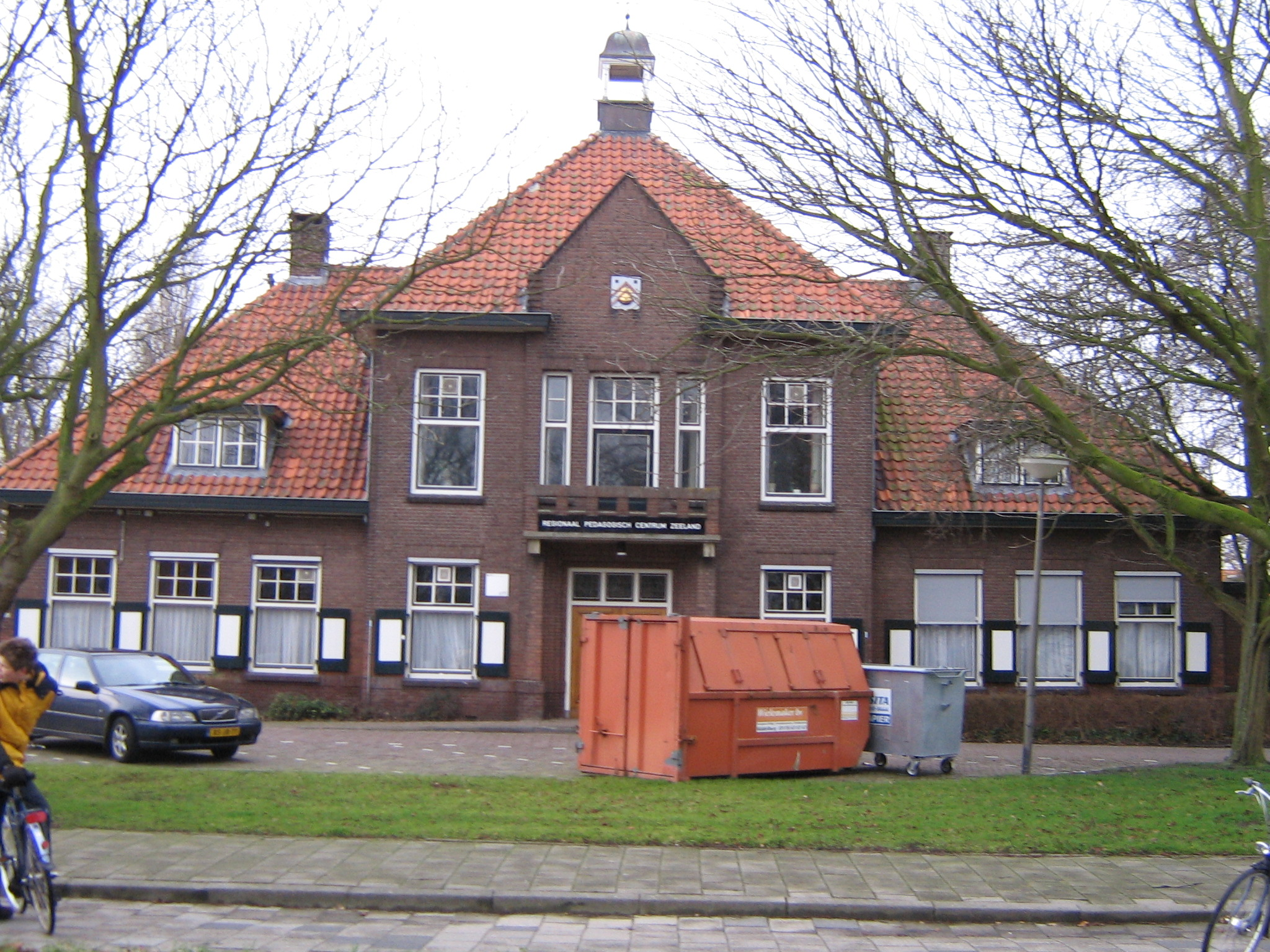 Sint-Lauwers, vomaeleg gemeênte-uus. Sint-Laurens, voormalig gemeentehuis. Sint Laurens, former town hall.